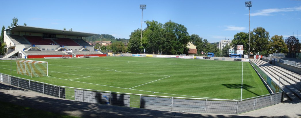 Stadion Schützenwiese, Winterthur, Switzerland.